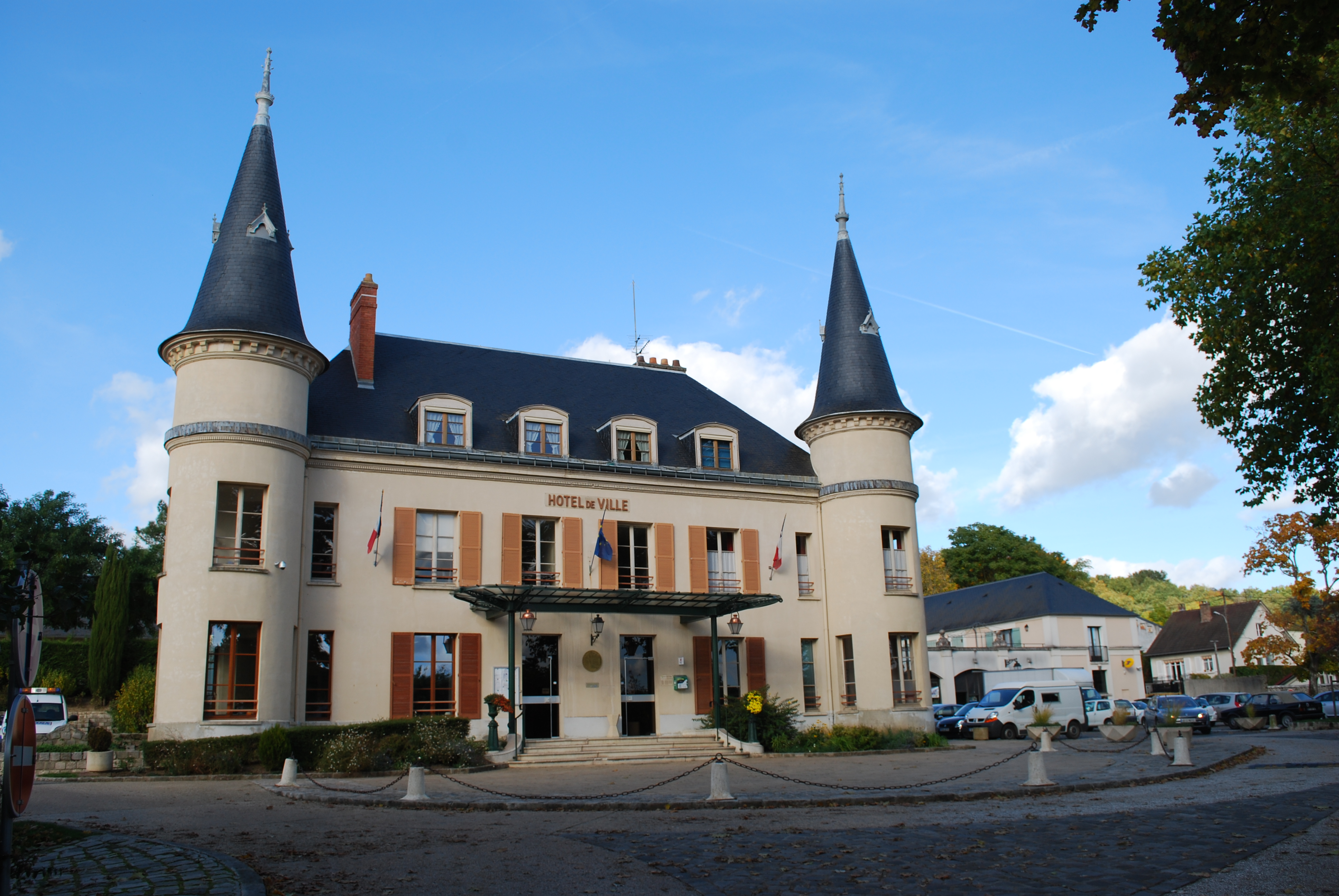 Hôtel de Ville, Saint-Chéron